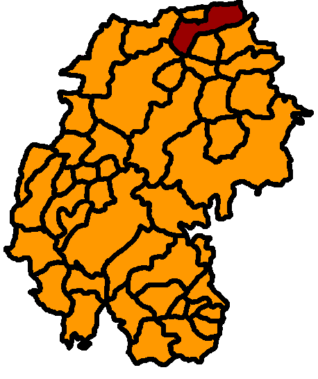 Kirchheim hervorgehoben, Ilm-Kreis